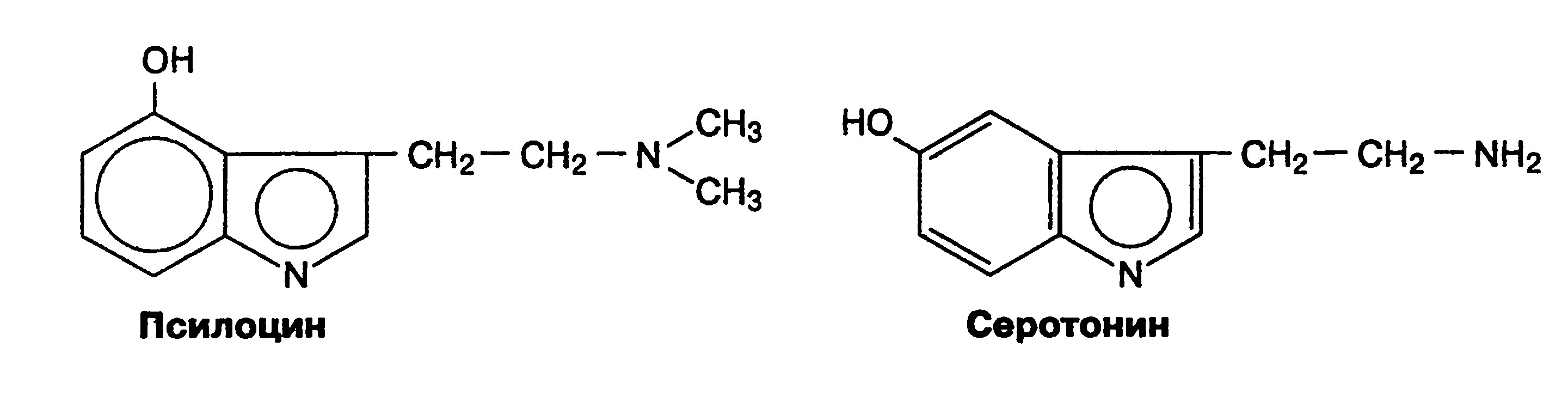 Сравнение формул псилоцина и серотонина